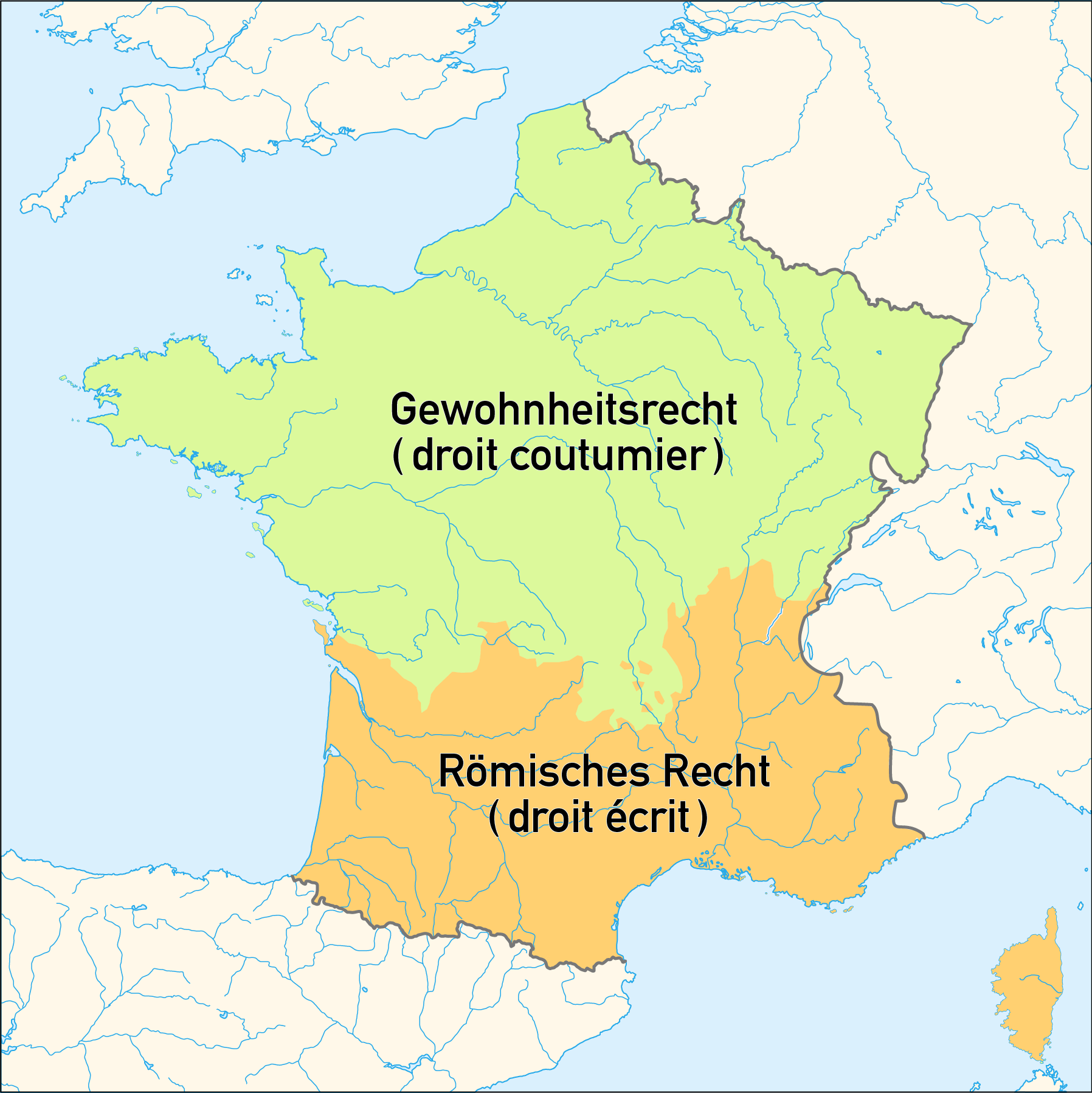 Karte der Rechtskreise des droit écrit (Römisches Recht) und des droit coutumier (Gewohnheitsrecht) im französischen Ancien Regime